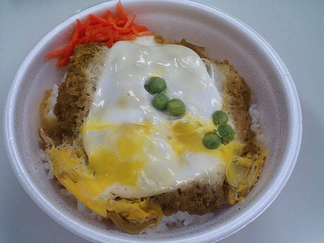 まい泉のヒレかつ丼。テイクアウトですが、ボリュームありすぎで残しました……。hirekatsu-don, pork fillet cutlet with rice